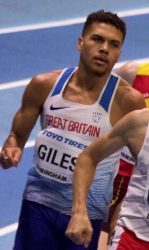 WK3B0136 800m finale man